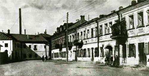 Забудова Камунальнай набярэжнай, якая выходзіла да р. Свіслач. Знесена ў 1970-х